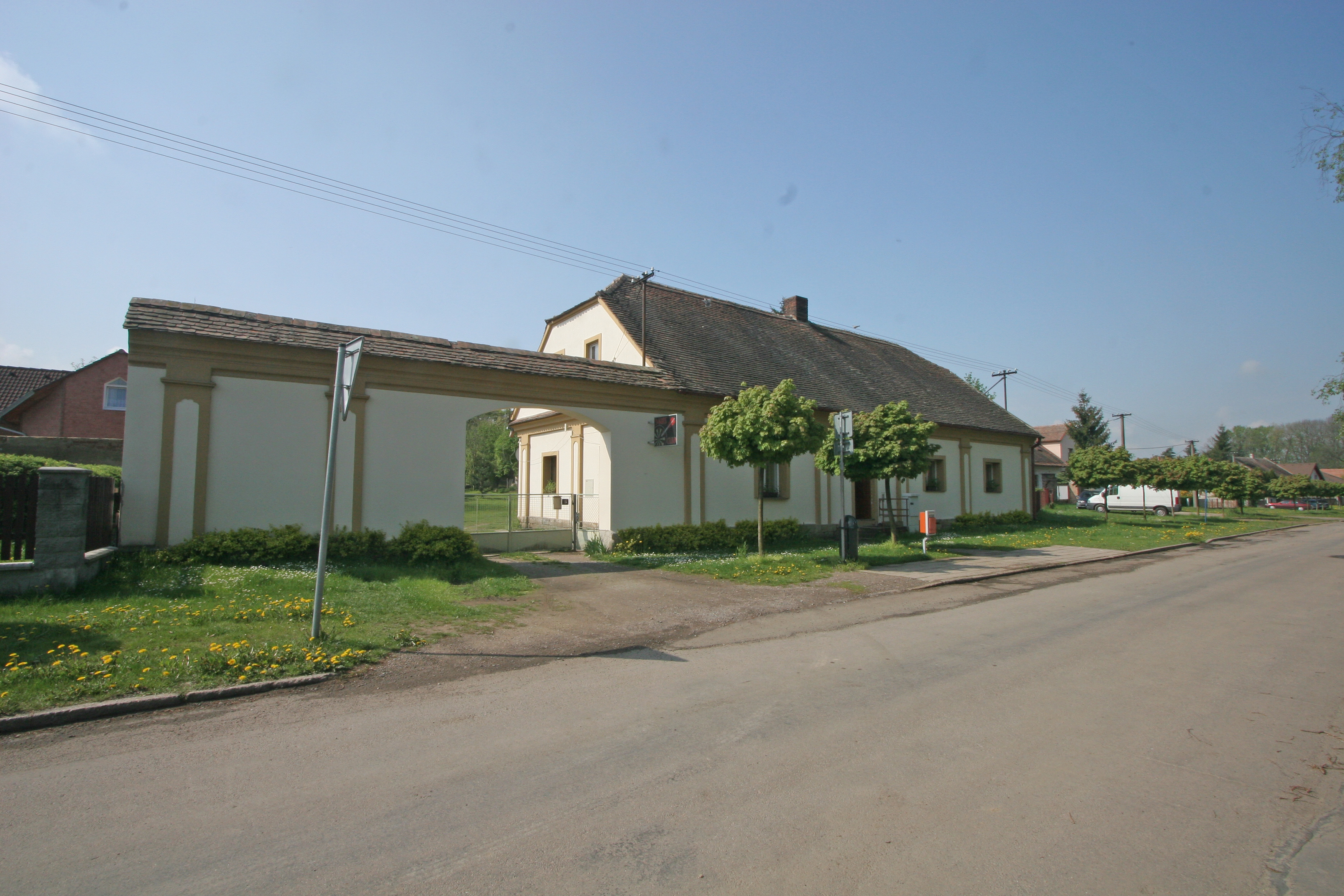 Hostovice čp. 8